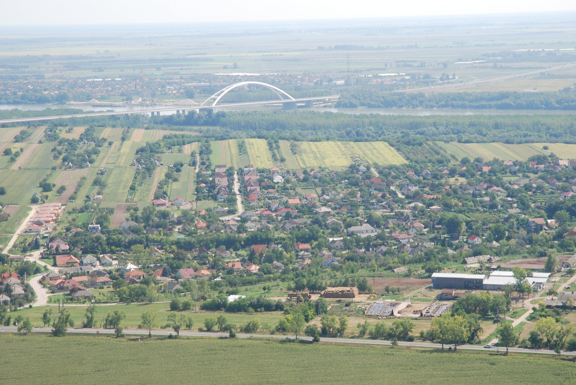 Kisapostag felülről